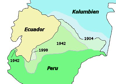 Geschichte Ecuadors Gebietsverluste